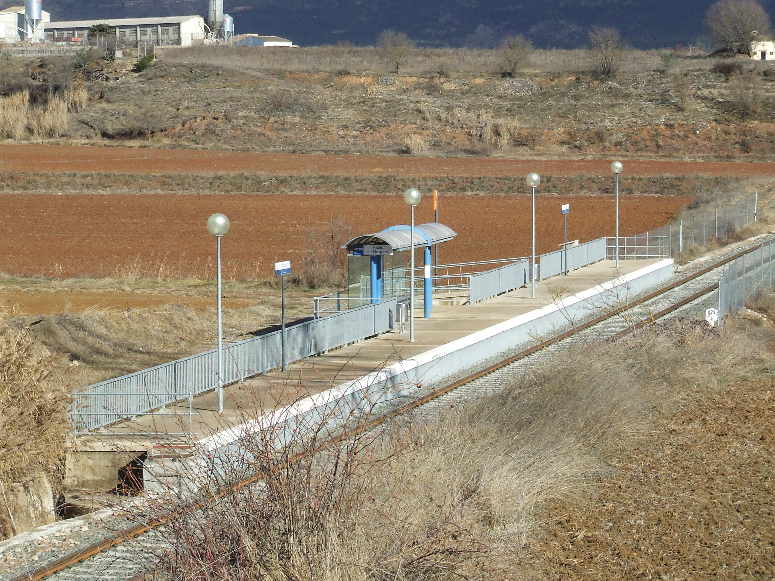 Estacio de tren de Palau de Noguera (Tremp, Pallars Jussà)